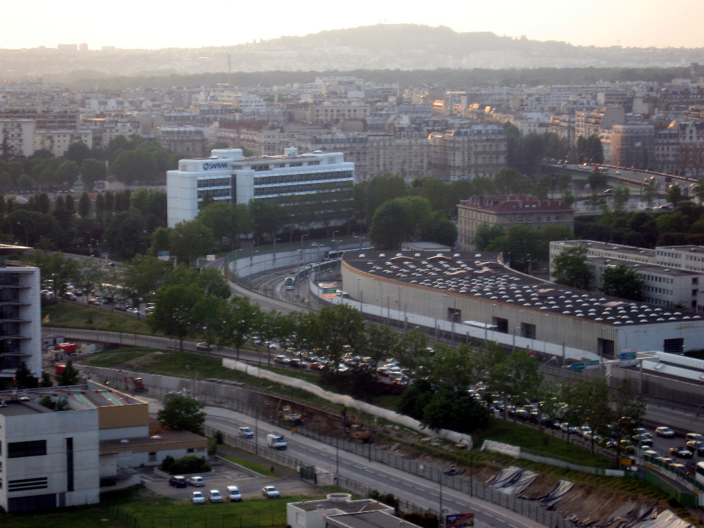 Atelier de la ligne T3 du tramway de Paris + travaux d'extension du T2. Périphérique au milieu, pont du Garigliano au fond.